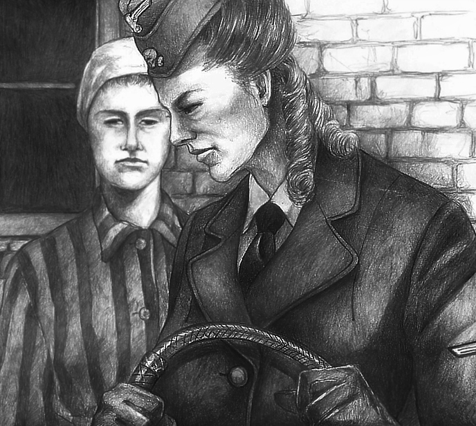 SS-Aufseherin: Female Camp Guards